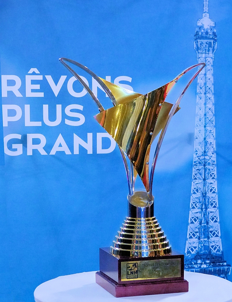 Le trophée des champions remporté le 07 septembre 2014 par le PSG Handball. Ici il est présenté au stade Pierre de Coubertin lors du premier match de la saison, le 11 septembre 2014.